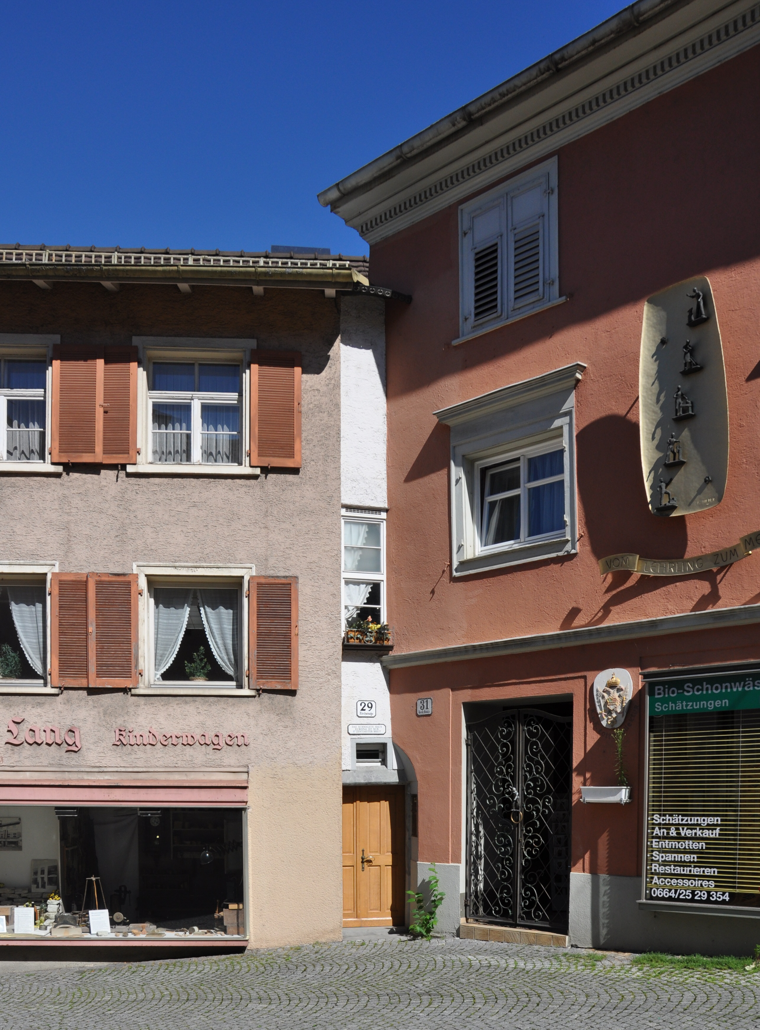 Bregenz, Haus Kirchstraße 29 (Mitte), „das schmalste Haus Europas“